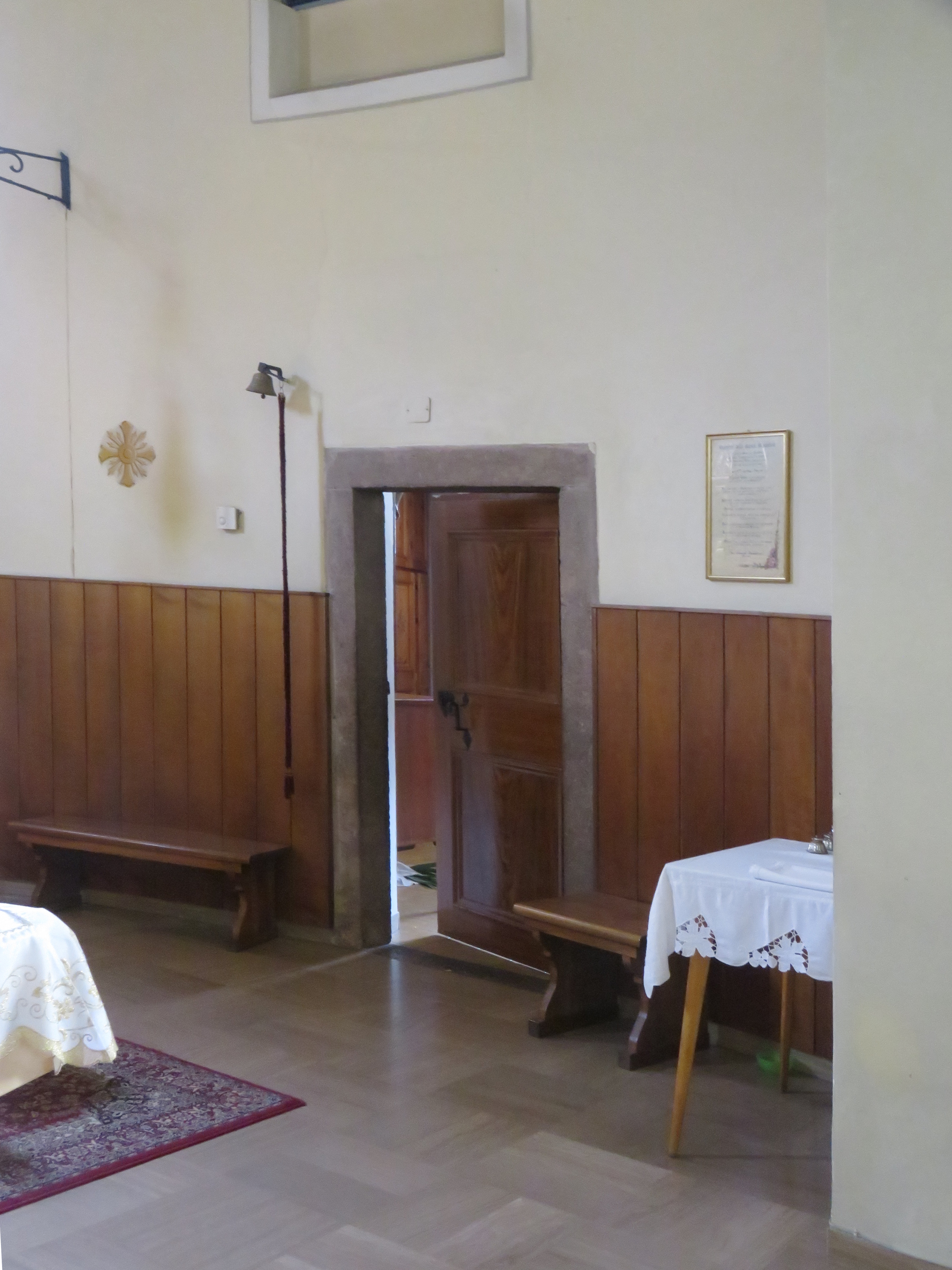 Chiesa della Santissima Trinità. Accesso alla sacrestia dal presbiterio.